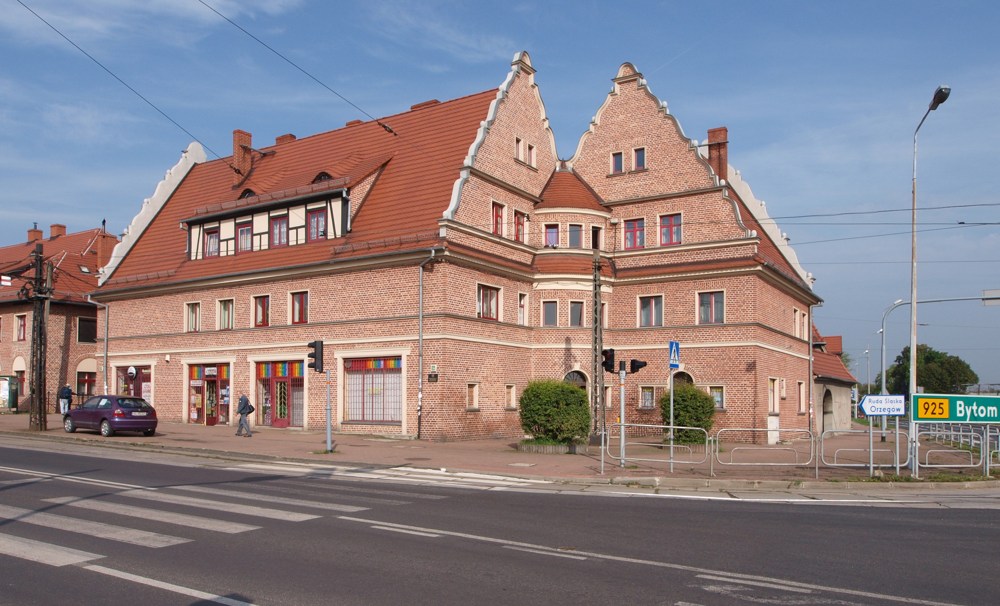 Ulica Wolności w Rudzie Śląskiej. Budynek nr 114.